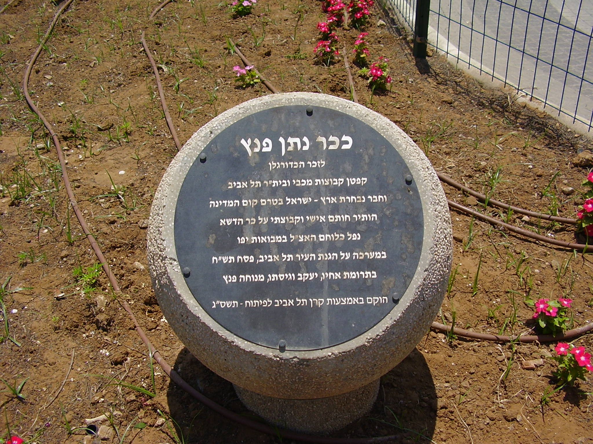 כיכר נתן פנץ